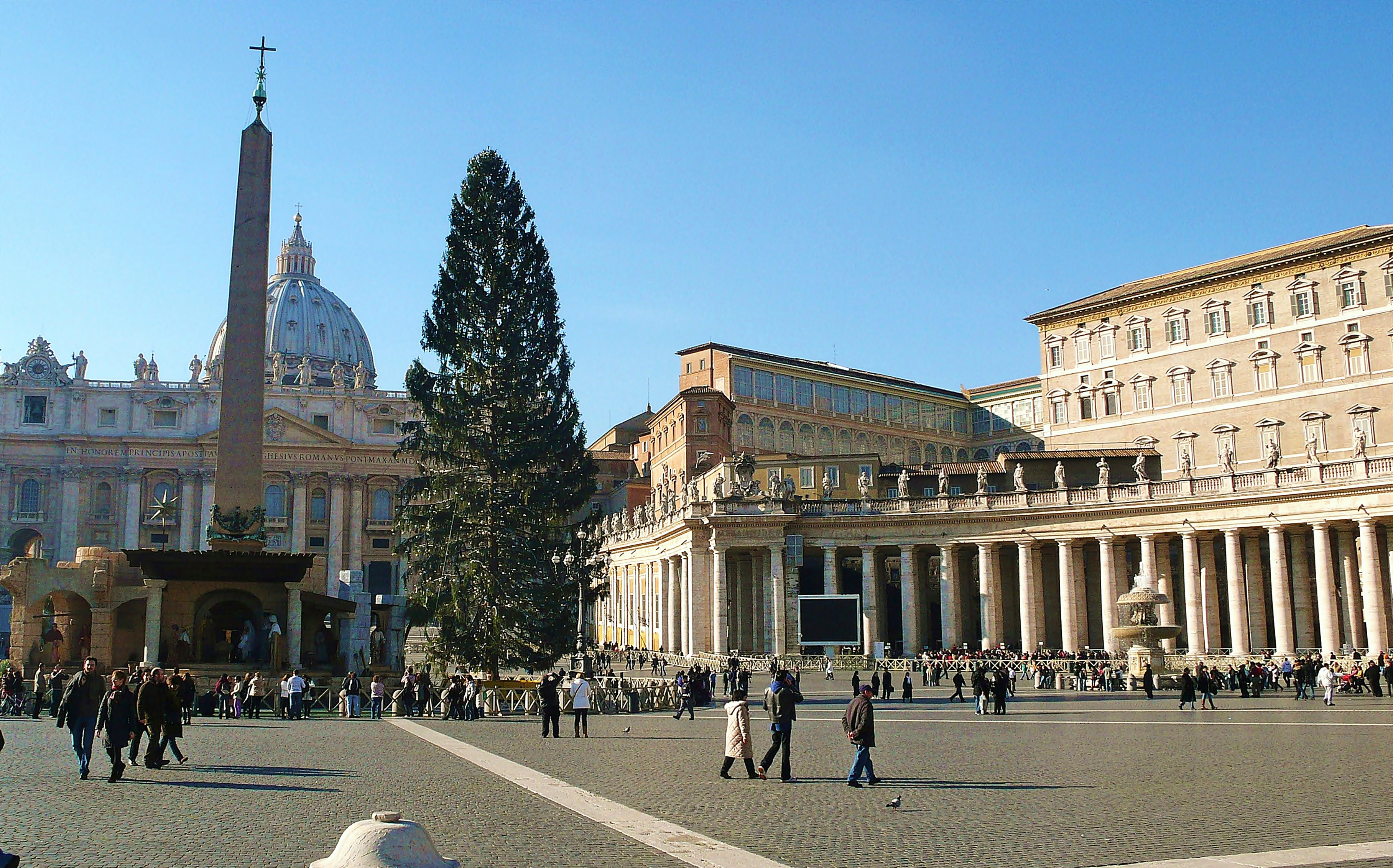 vaticano-roma